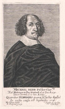 Porträt des Malers und Kupferstechers Michael Herr in Nürnberg.